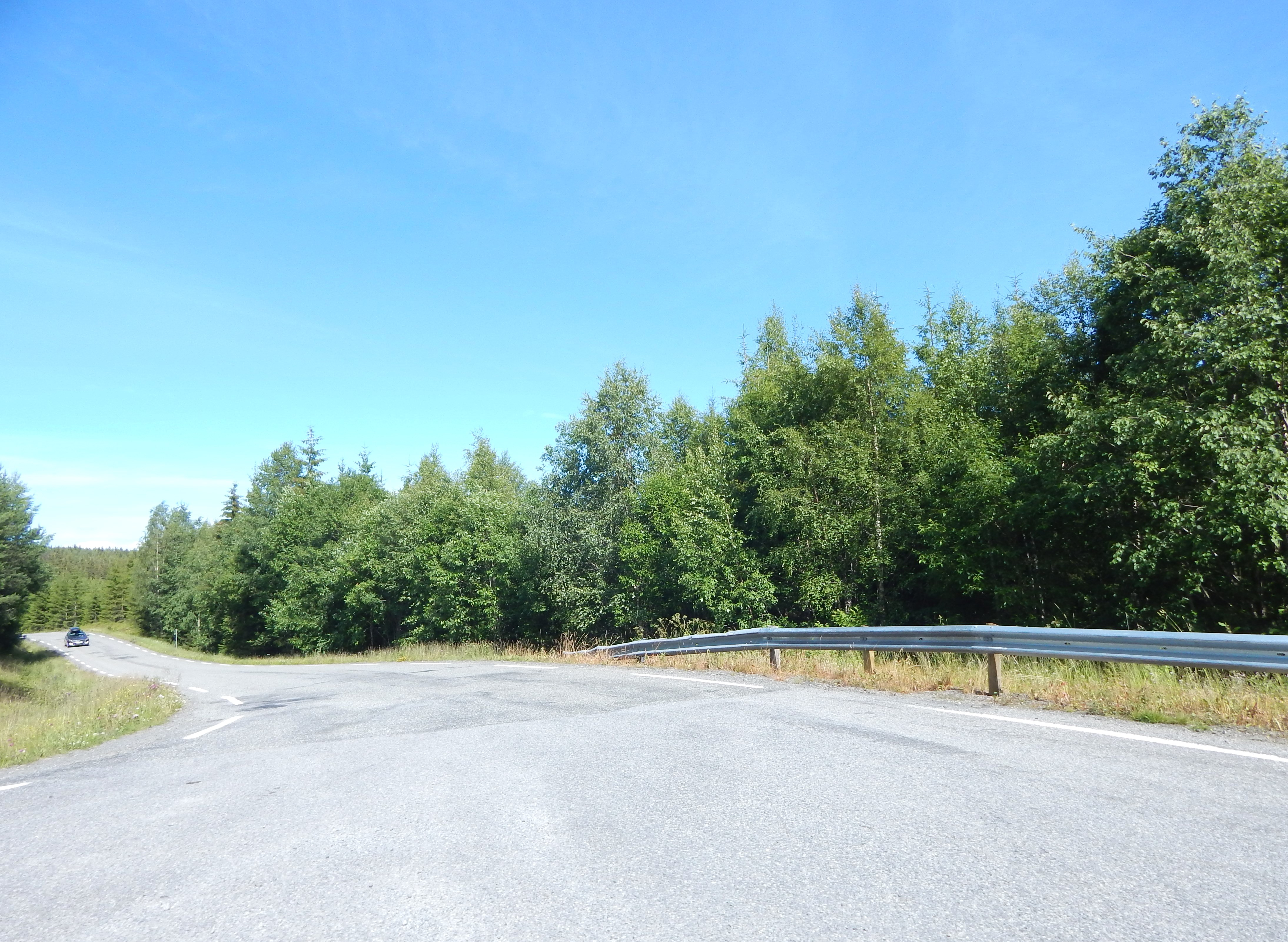 Kluftmovegen (fylkesvei 1664, tidl. 7) nordøst for Næroset